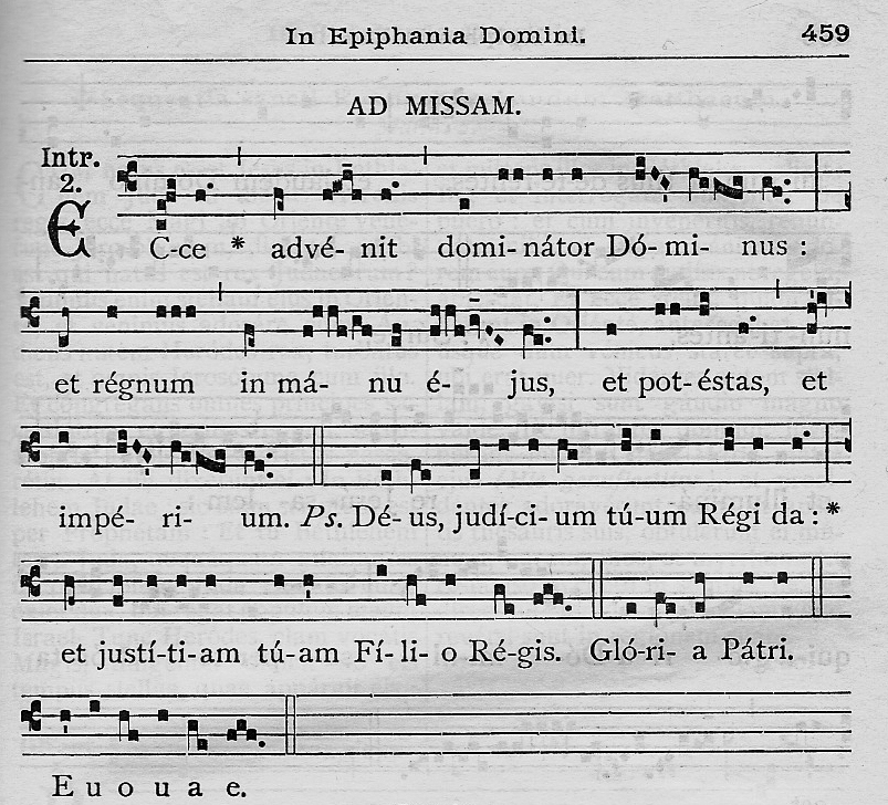 Introitus "Ecce advenit dominator", Epiphanie - Quelle: Liber usualis missae et officii pro dominicis et festis cum cantu Gregoriano, Parisii, Tornaci, Romae 1954, p. 459